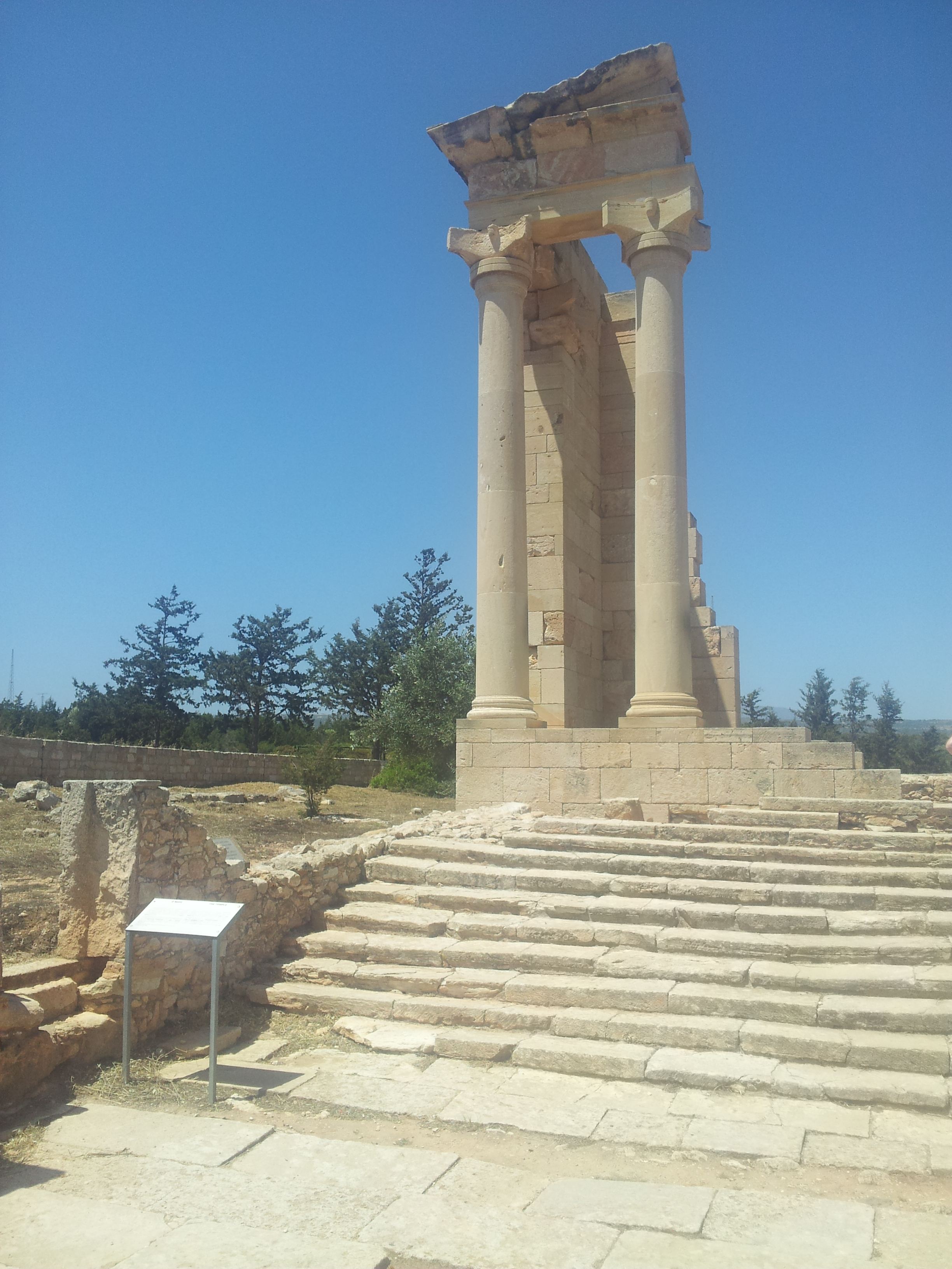 Kourion by Paride